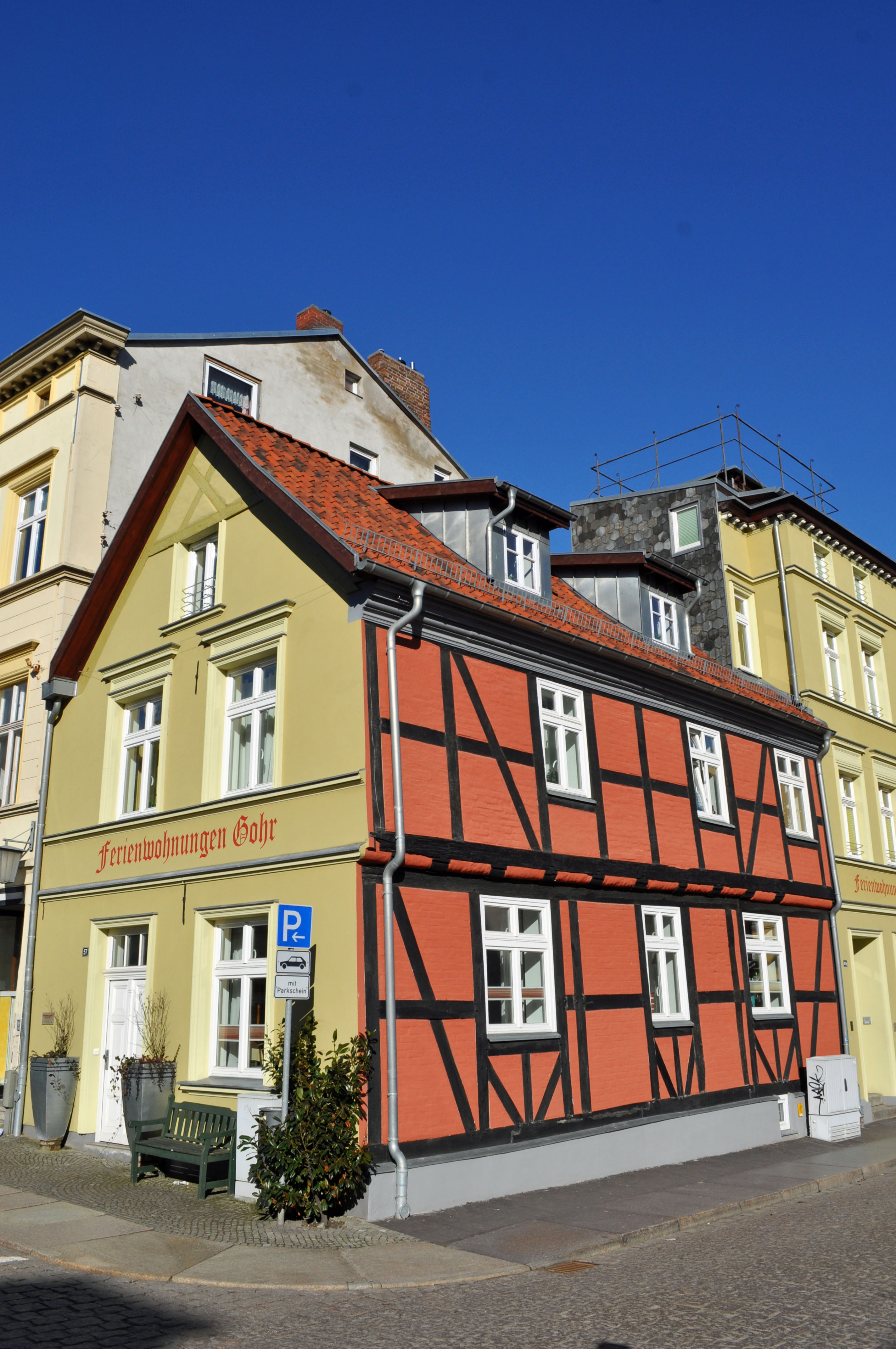 Gebäude bzw. Gebäudedetail in Stralsund. Straße und Hausnummer siehe Dateiname. Das Gebäude ist als Baudenkmal ausgewiesen, siehe dazu die Liste der Baudenkmale in Stralsund.